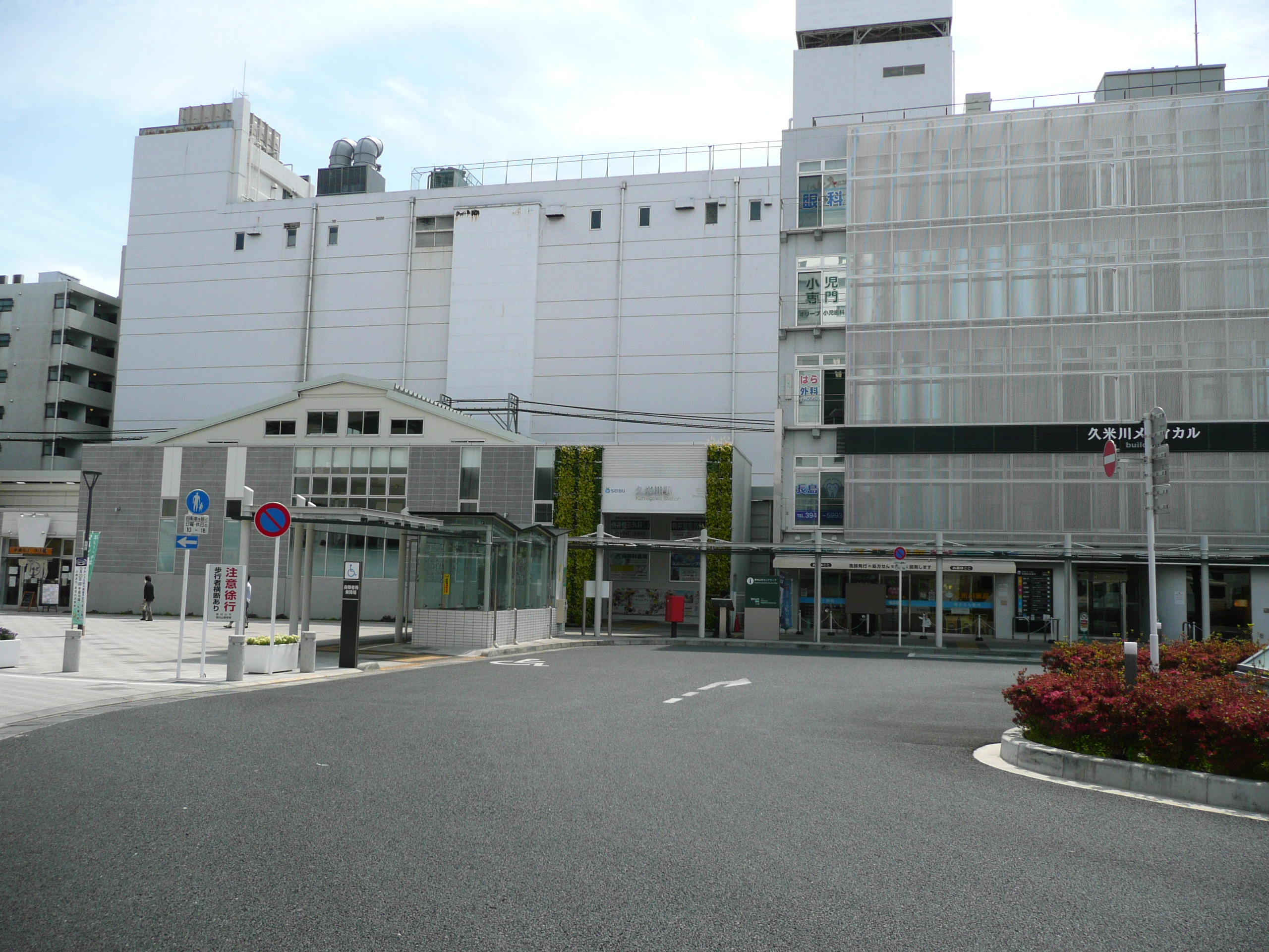 久米川駅北口